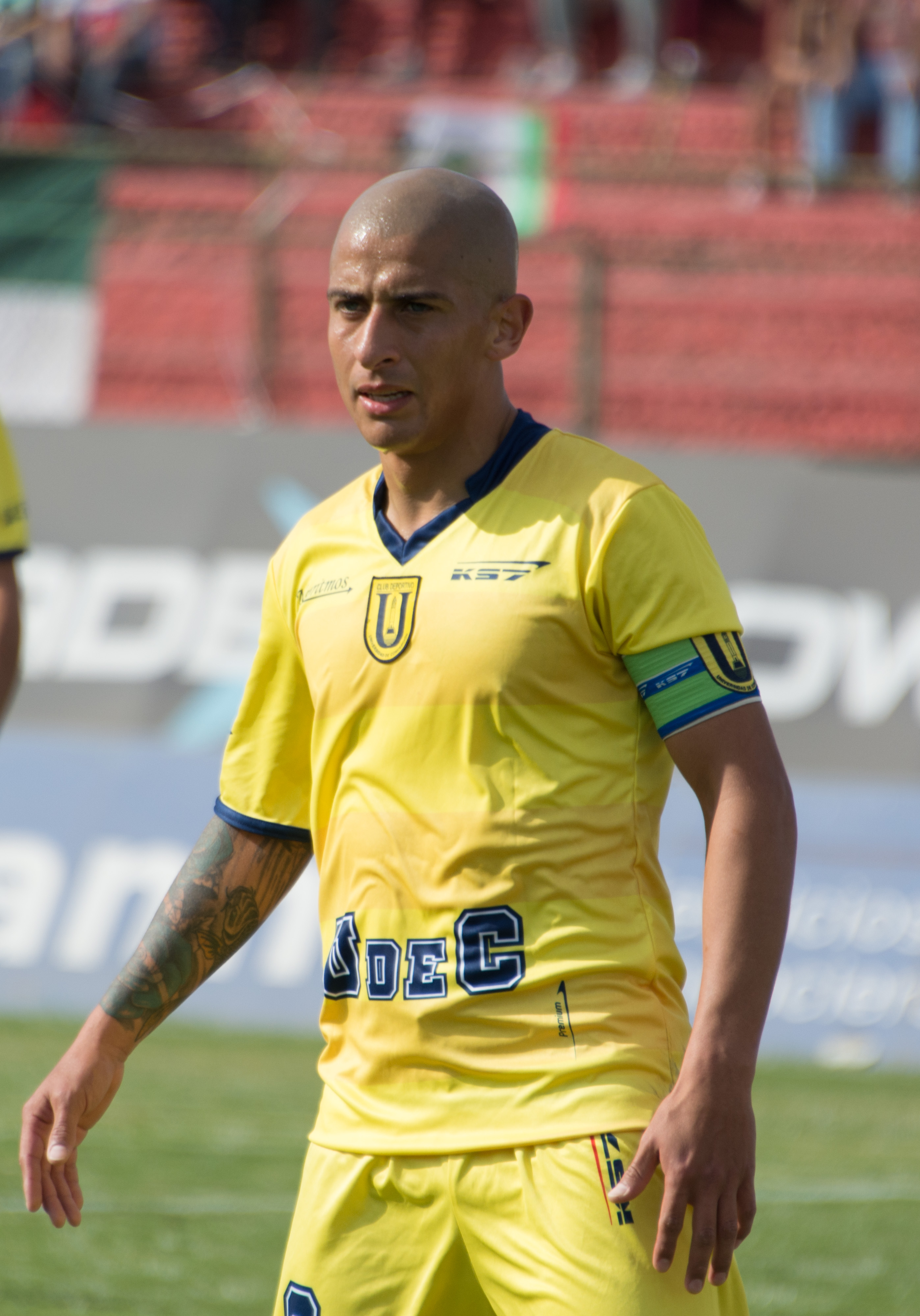 Alejandro Camargo, Palestino v Universidad de Concepción, Estadio Municipal de La Cisterna, La Cisterna, Santiago, Chile.